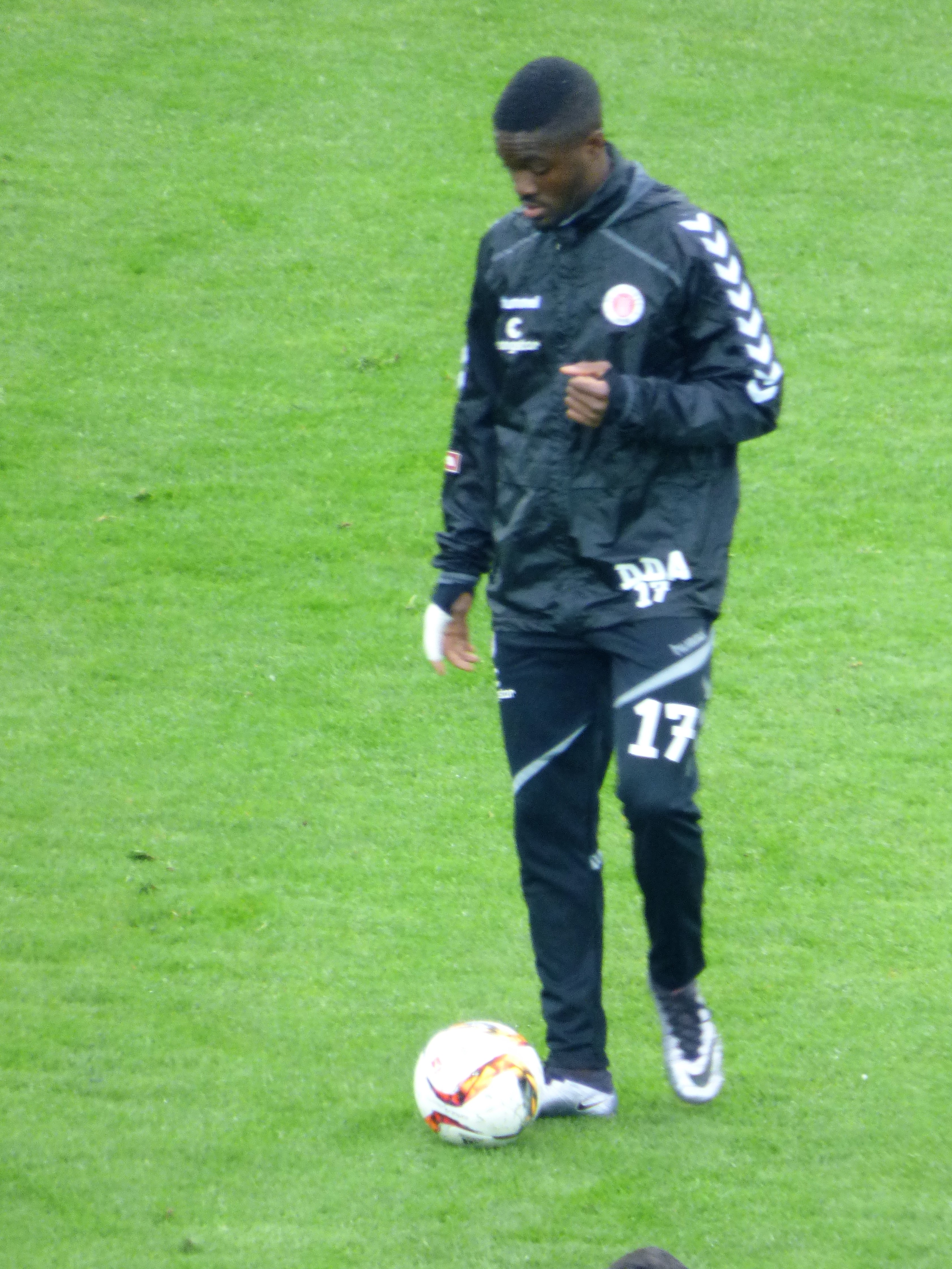 Davidson Eden, FC St.Pauli